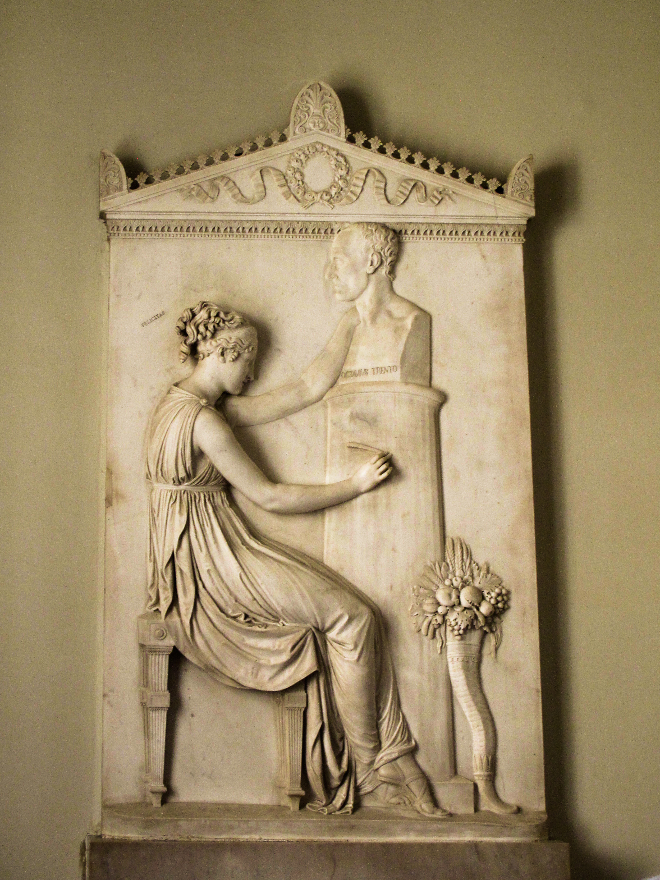 Ottavio Trento - Monumento del Canova